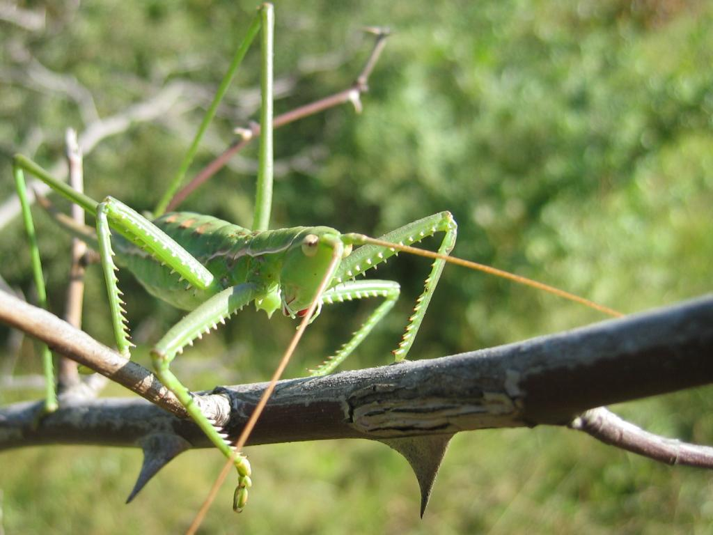 Sägeschrecke Saga Pedo - Hundsheimer Berg, Österreich. Fotografiert bei einer Uni Exkursion mit Prof. Böhme aus dem ZFMK, Bonn. Die Saga Pedo kommt in Natur nie auf kahlen Sträuchern oder Bäumen vor (wäre auch keine gute Tarnung). Sie wurde nur für das Foto auf den Zweig gesetzt.